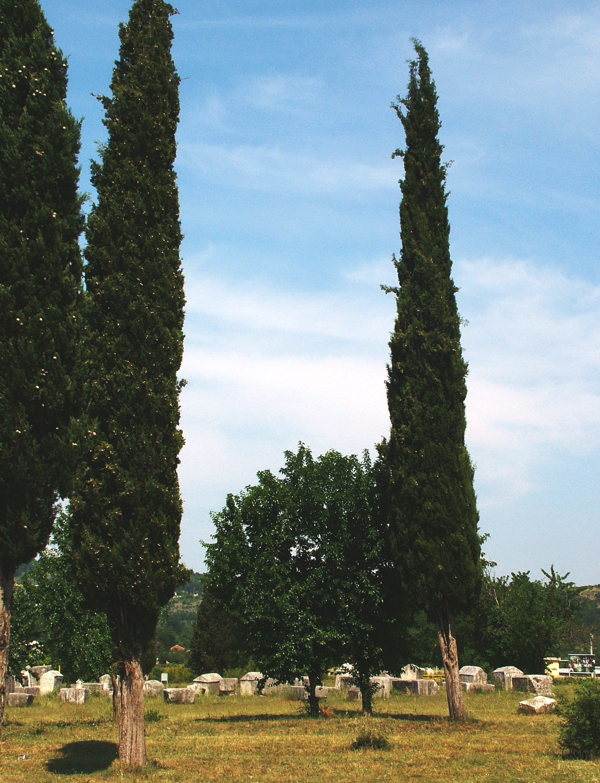 Radimlje, bogumil nekropolisz (Bosznia)